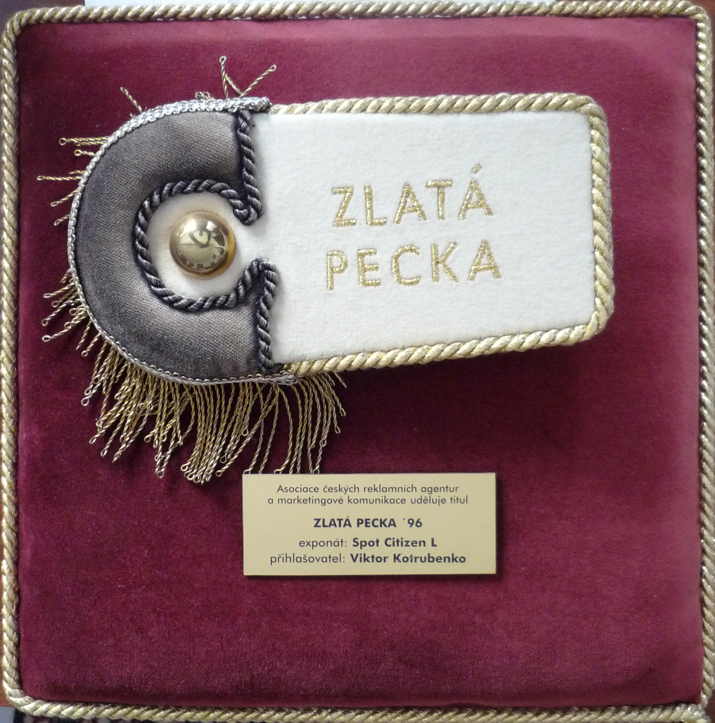 ocenění